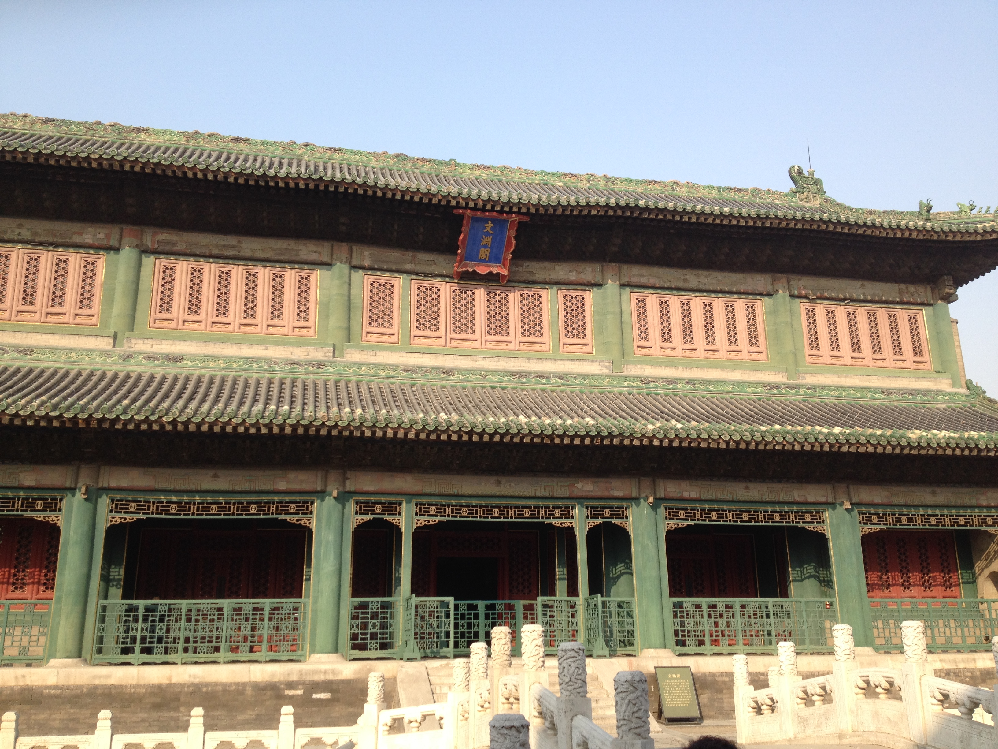 北京故宫中的文渊阁